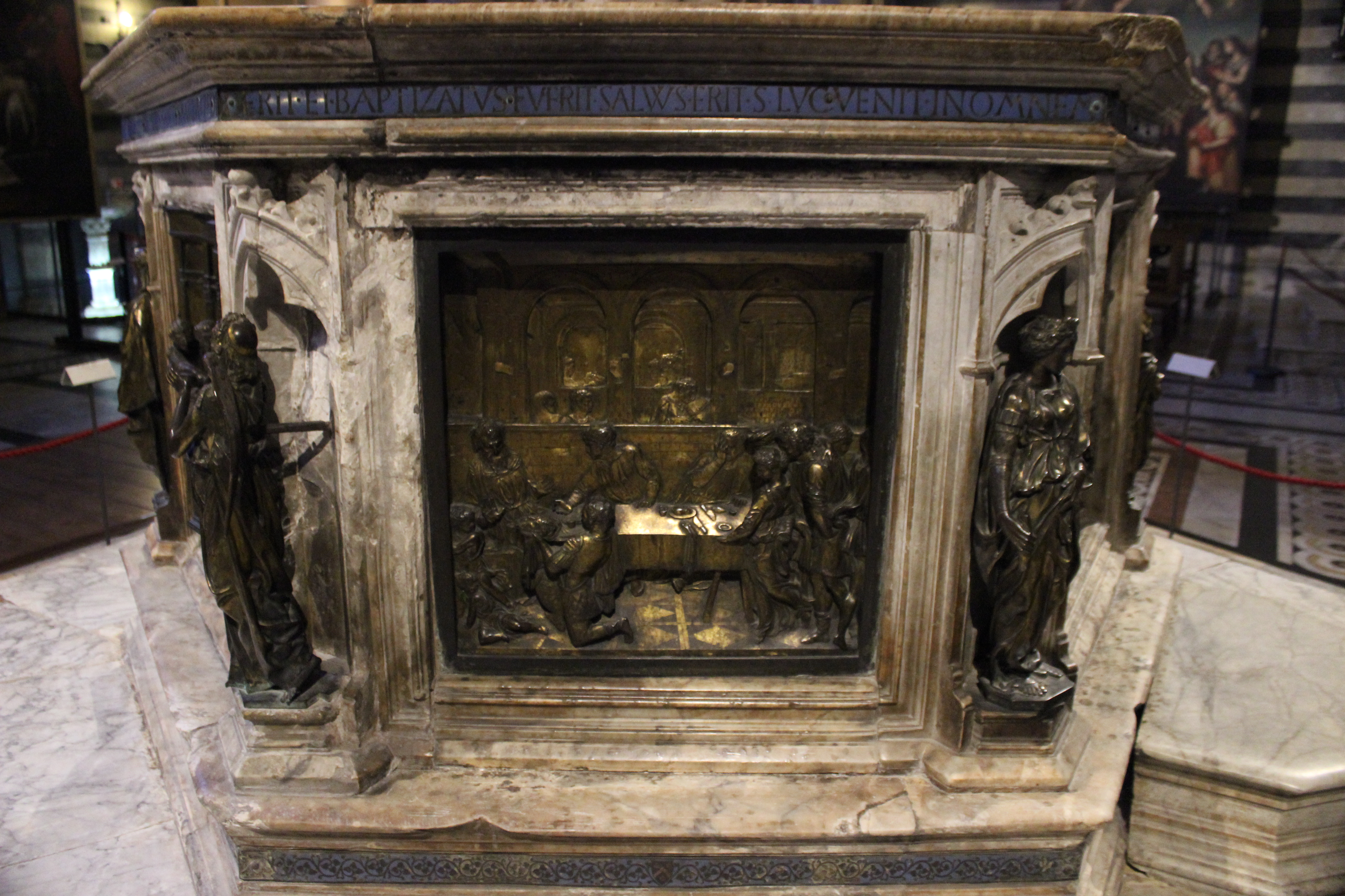 Siena. Baptisterio. Fuente bautismal.